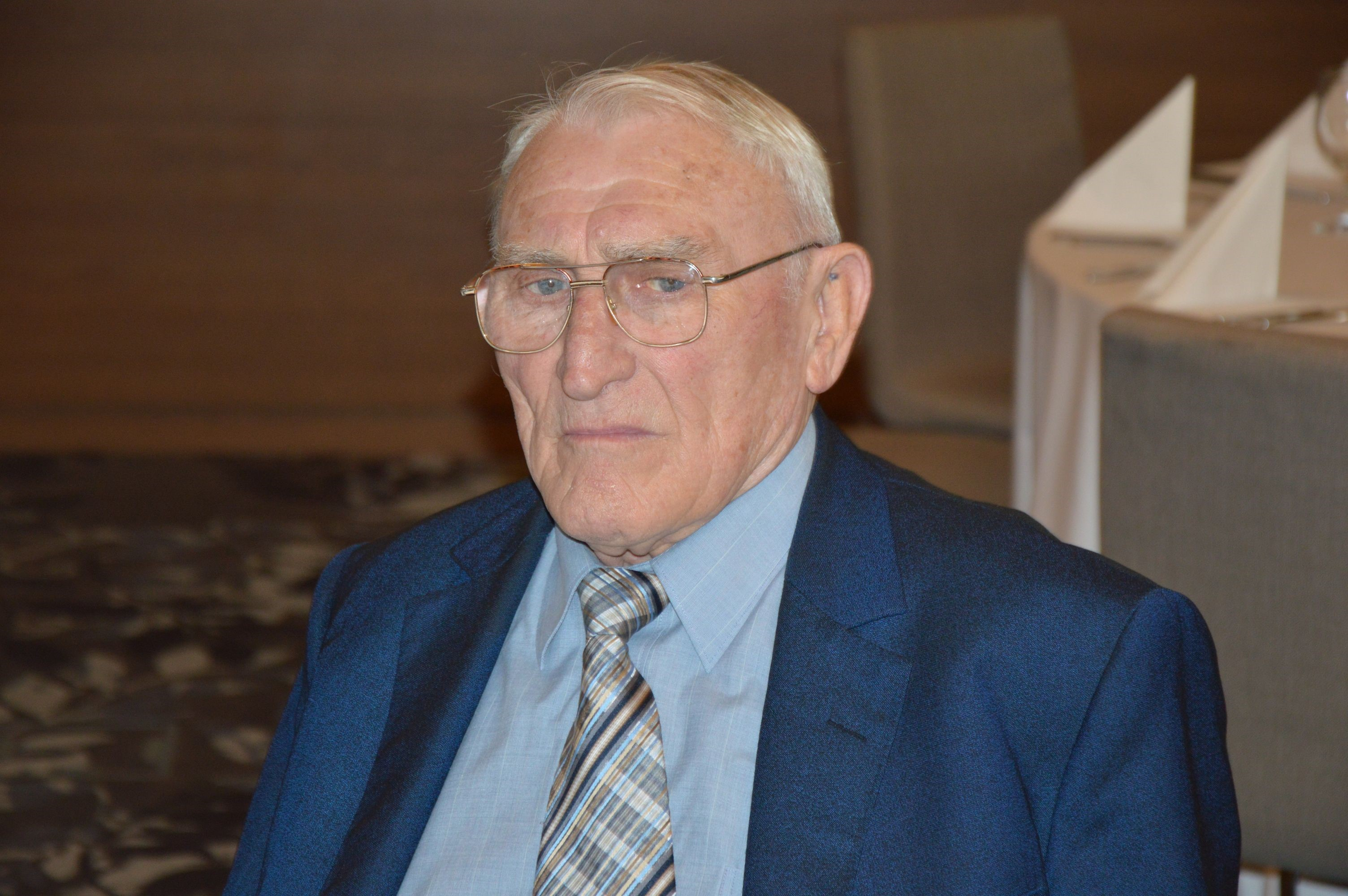 Faragó Lajos olimpiai bronzérmes, válogatott labdarúgó, edző